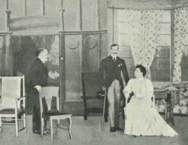 Los actores Luis Medrano, Fernando Díaz de Mendoza y María Guerrero en una escena del estreno de la obra de teatro Más fuerte que el amor, del dramaturgo español Jacinto Benavente